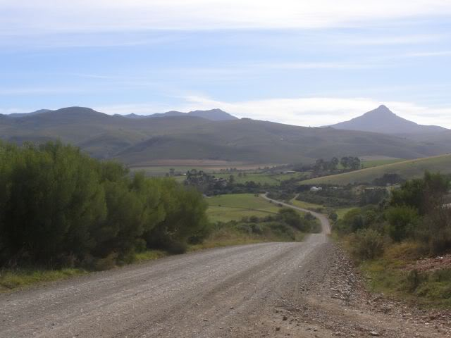 Vanaf 'n ander uitkykpunt.